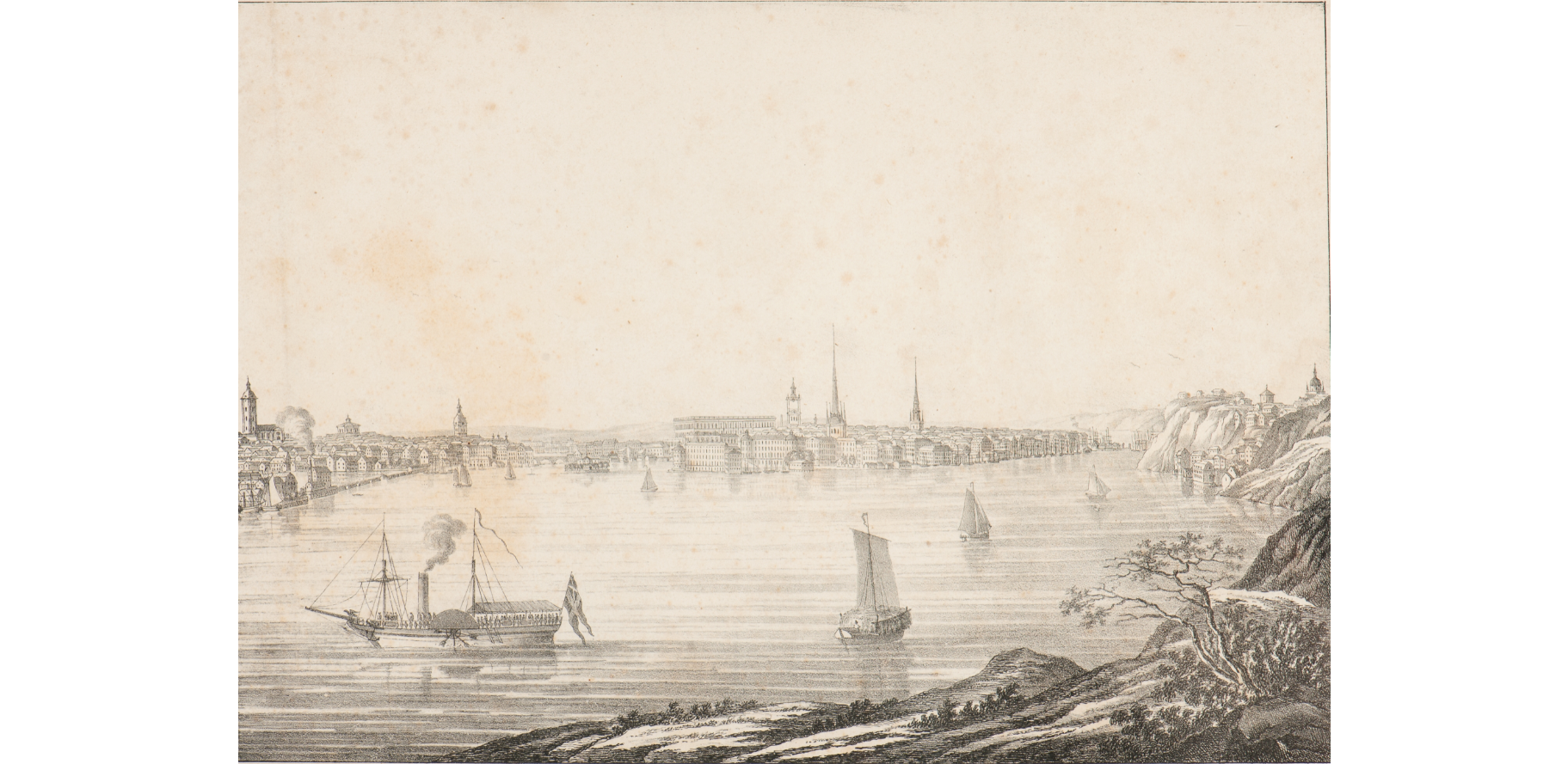 Utsikt över Stockholm från Långholmen mot stadens västra sida. Stockholm ca 1829